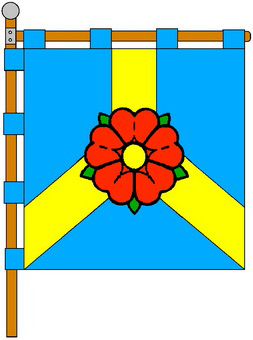 Хоругва смт Красне